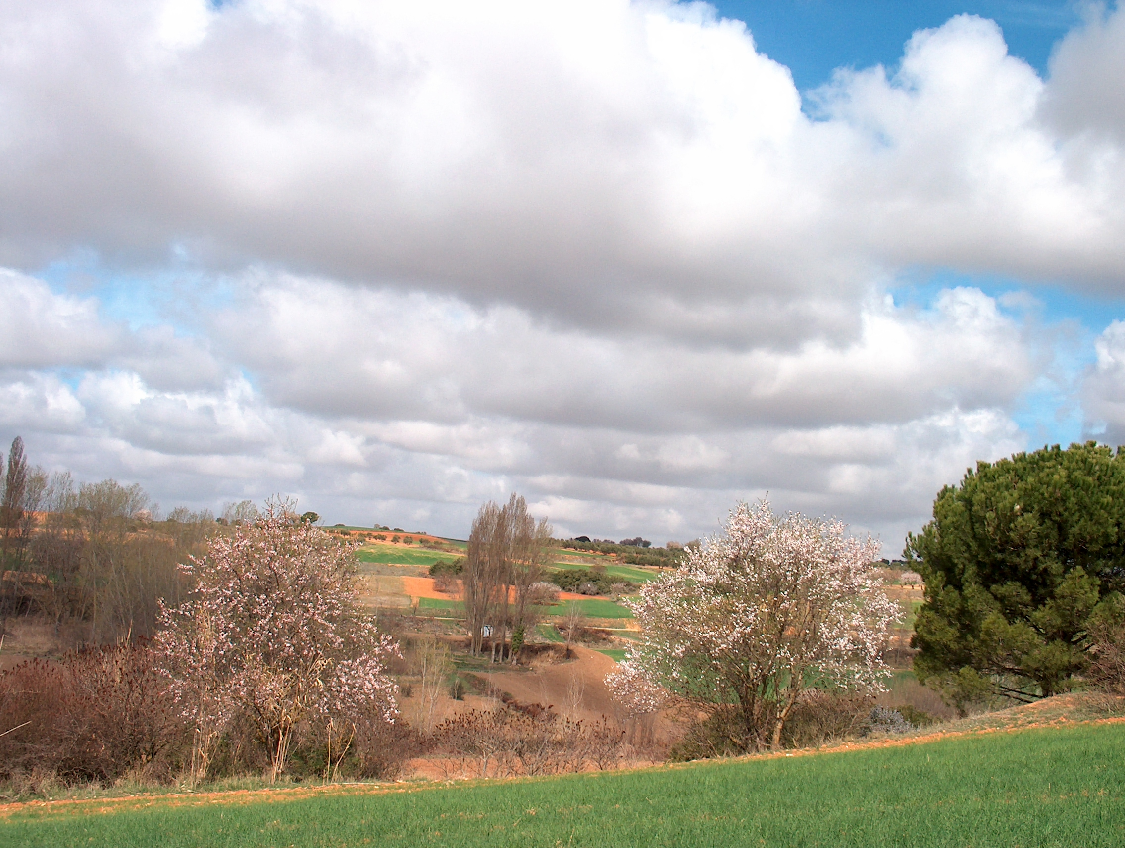 Imagen del campo entre Buenache y la ermita.